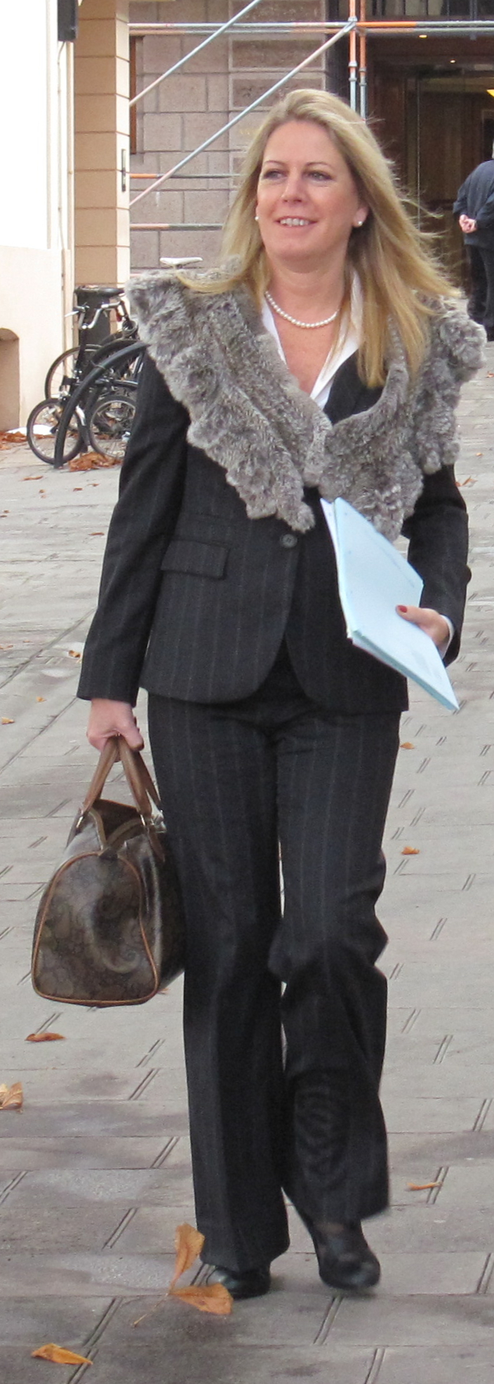 Nrf: Dans l'Vièr Marchi, Saint Hélyi, Jèrri: lé 14 dé Novembre, juste dévant l'assèrmentâtion des Membres d's Êtats dans la Cour Rouoyale.